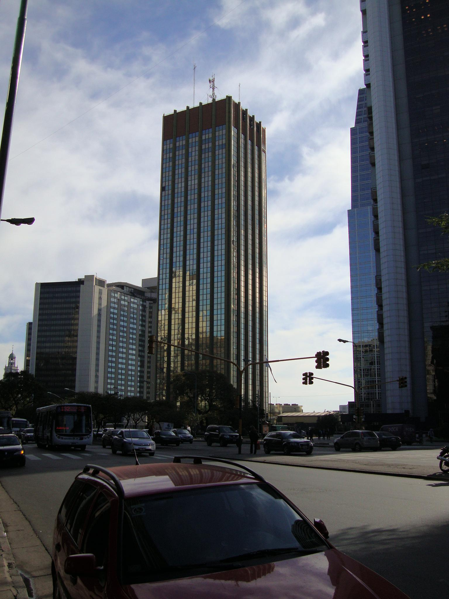 La Torre Catalinas Norte. Retiro, Buenos Aires, Argentina.